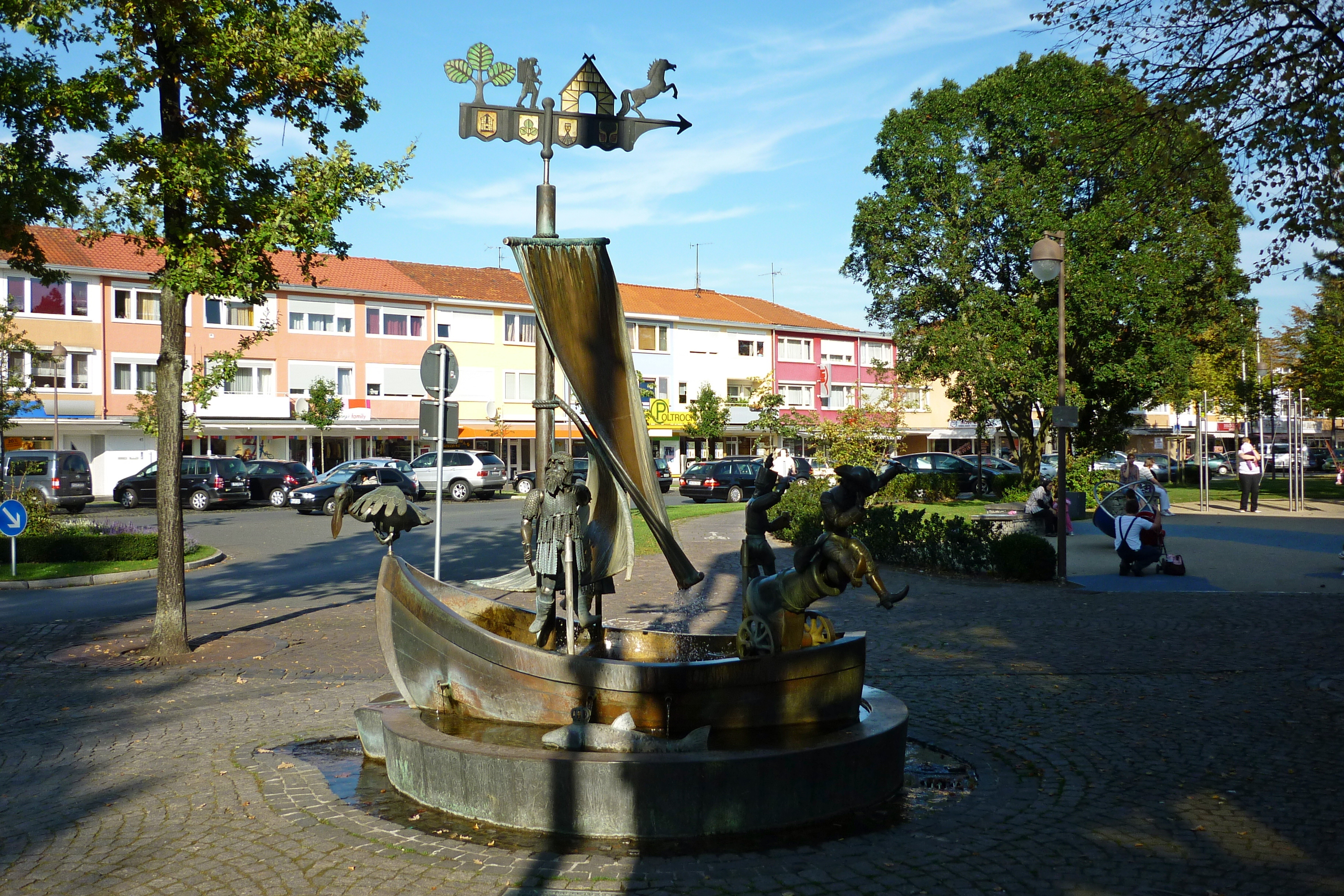 Espelkamp. Figurenbrunnen an der Breslauer Straße.